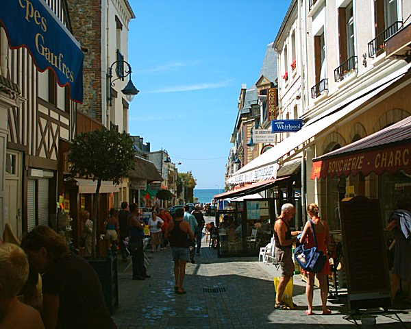 Pedestrian street in Villers-sur-Mer.